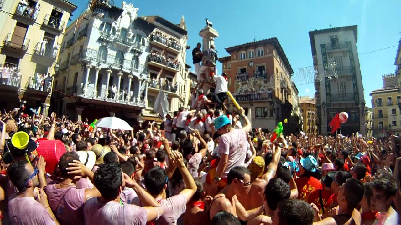 Puesta del Pañuelico